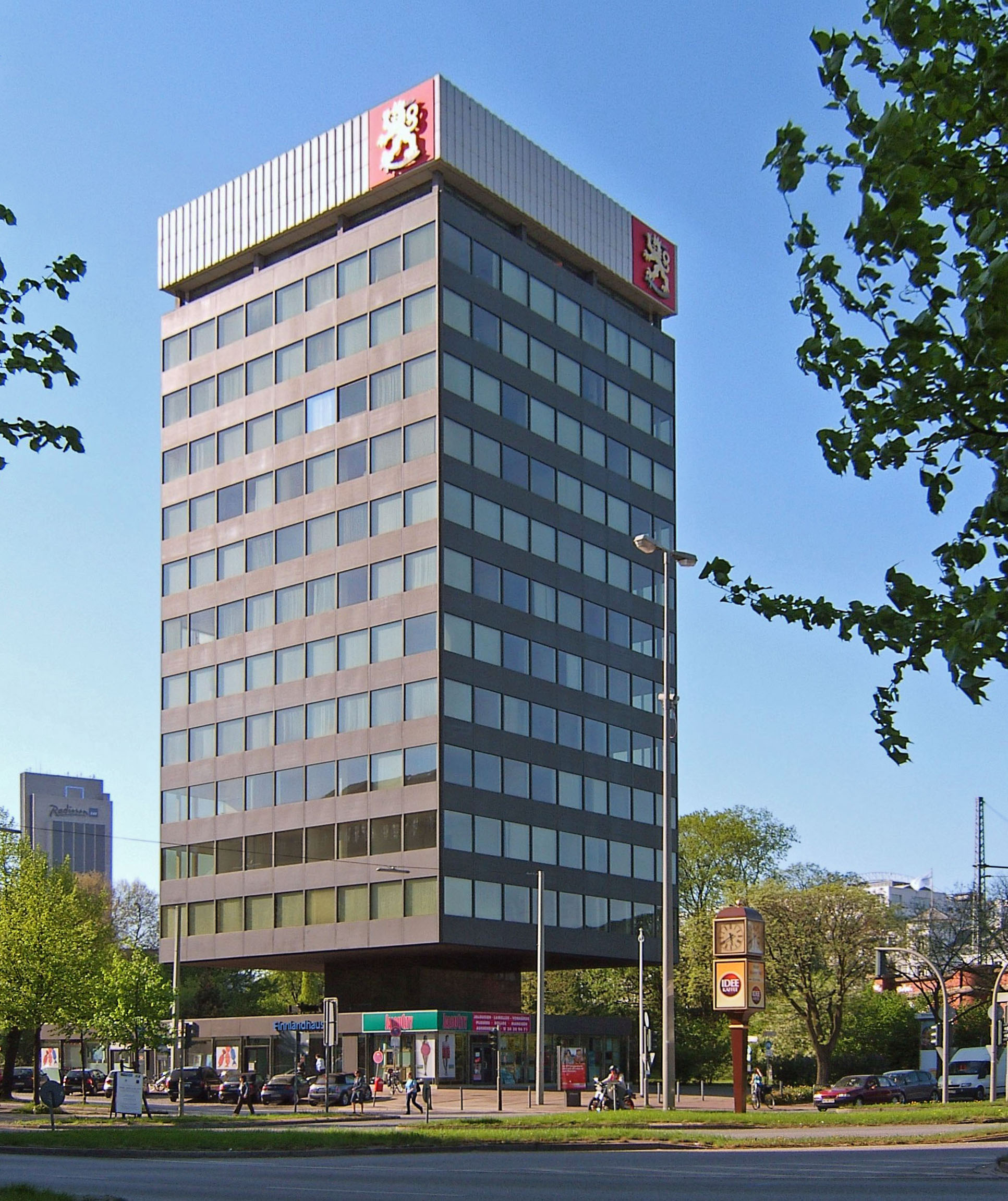 Hamburg, Finnlandhaus. Architekt: Helmut Hentrich (1905-2001).